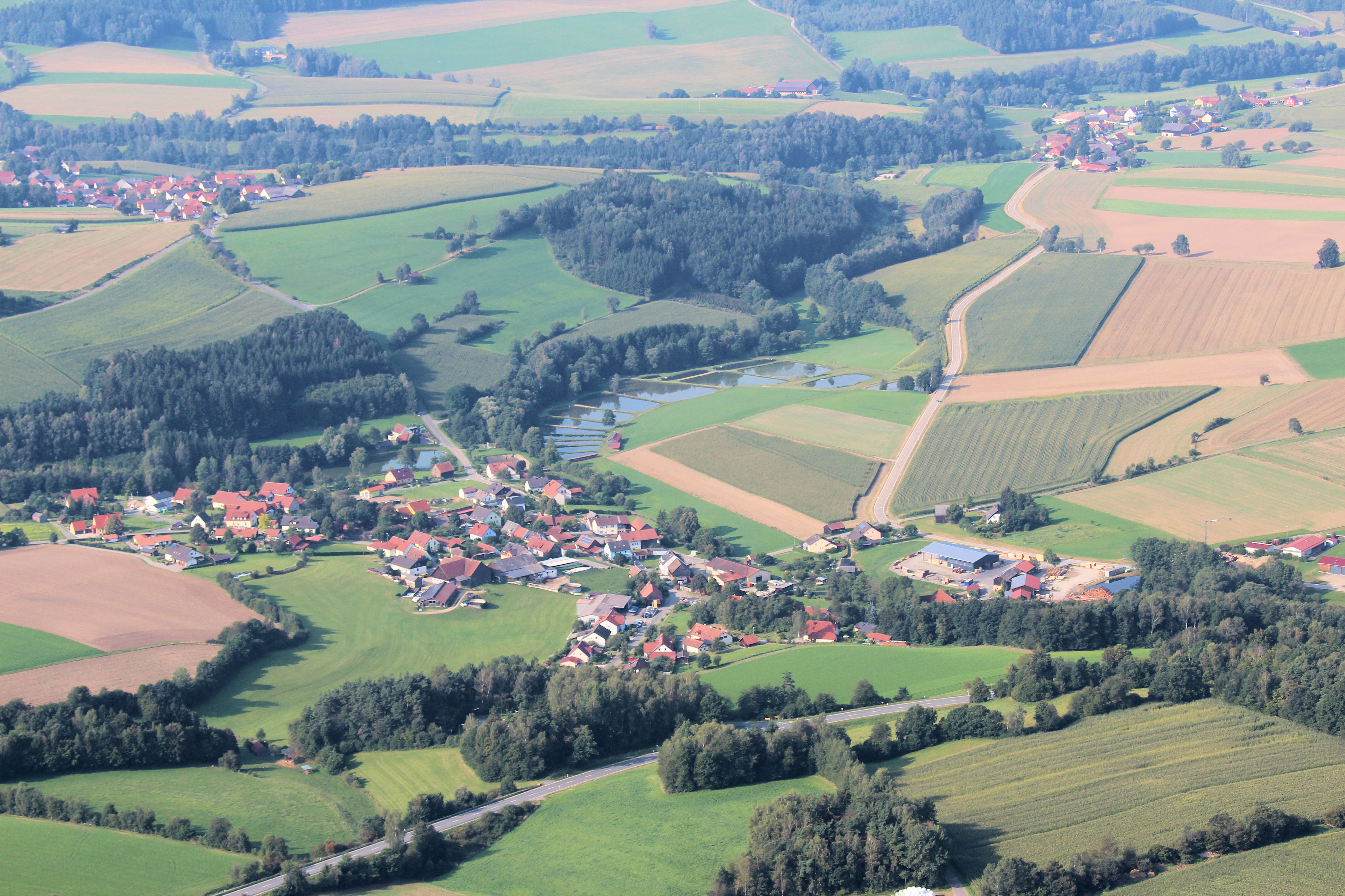 Lampenricht (Bildmitte), Teil von Gleiritsch (links oben), Bernhof (rechts oben),Bundesstraße B 22 unterer Bildrand; Gemeinde Gleiritsch, Landkreis Schwandorf, Oberpfalz, Bayern